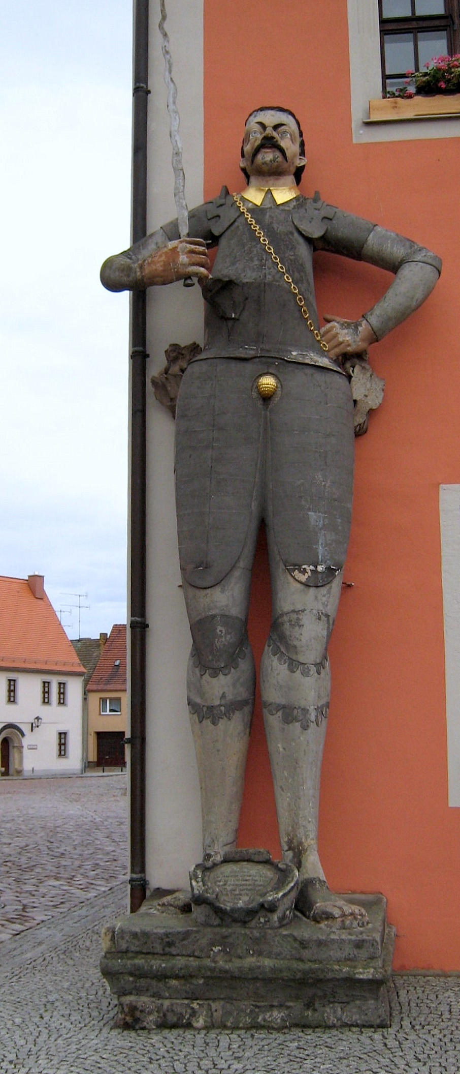 Der Roland zu Belgern, Kreis Nordsachsen